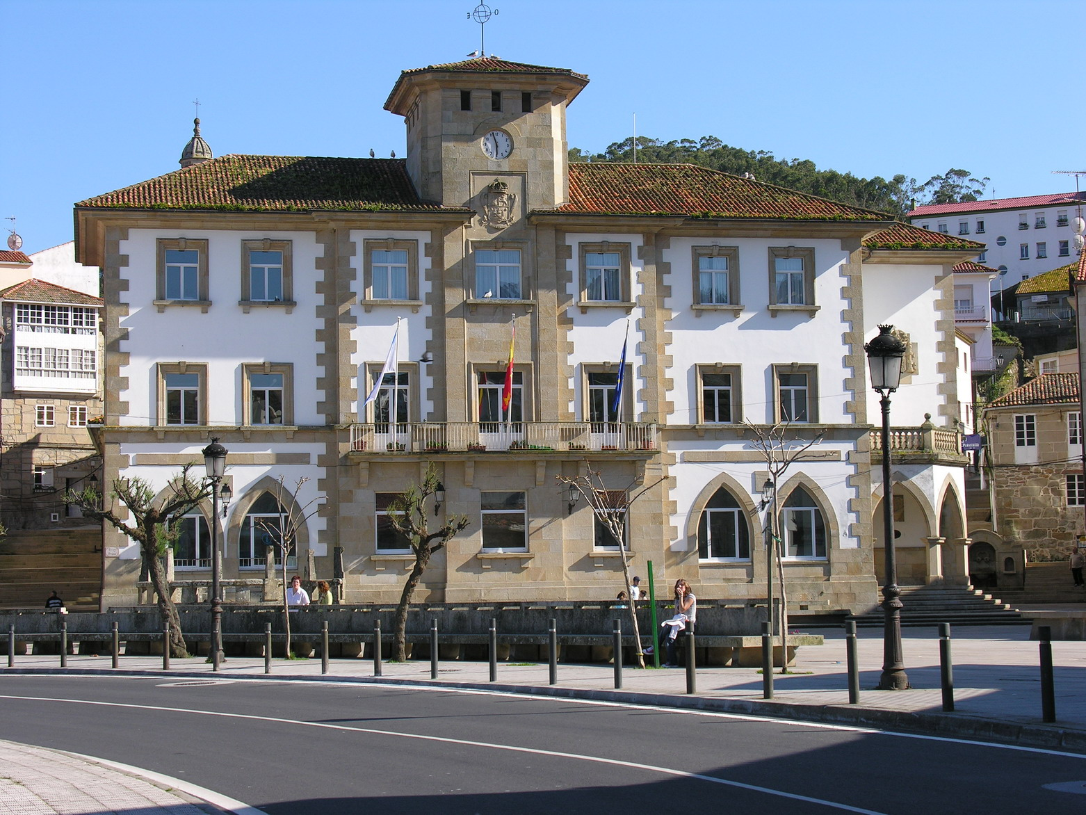 Casa do concello de Muros (Galicia)